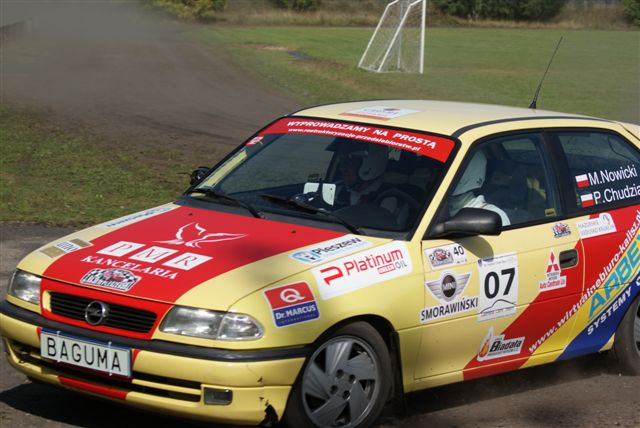 OS - 3.Rajd Pleszewski